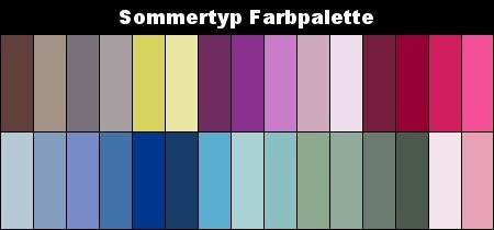 Farbpass für die Sommertyp-Farbpalette (Farb- und Stilberatung)